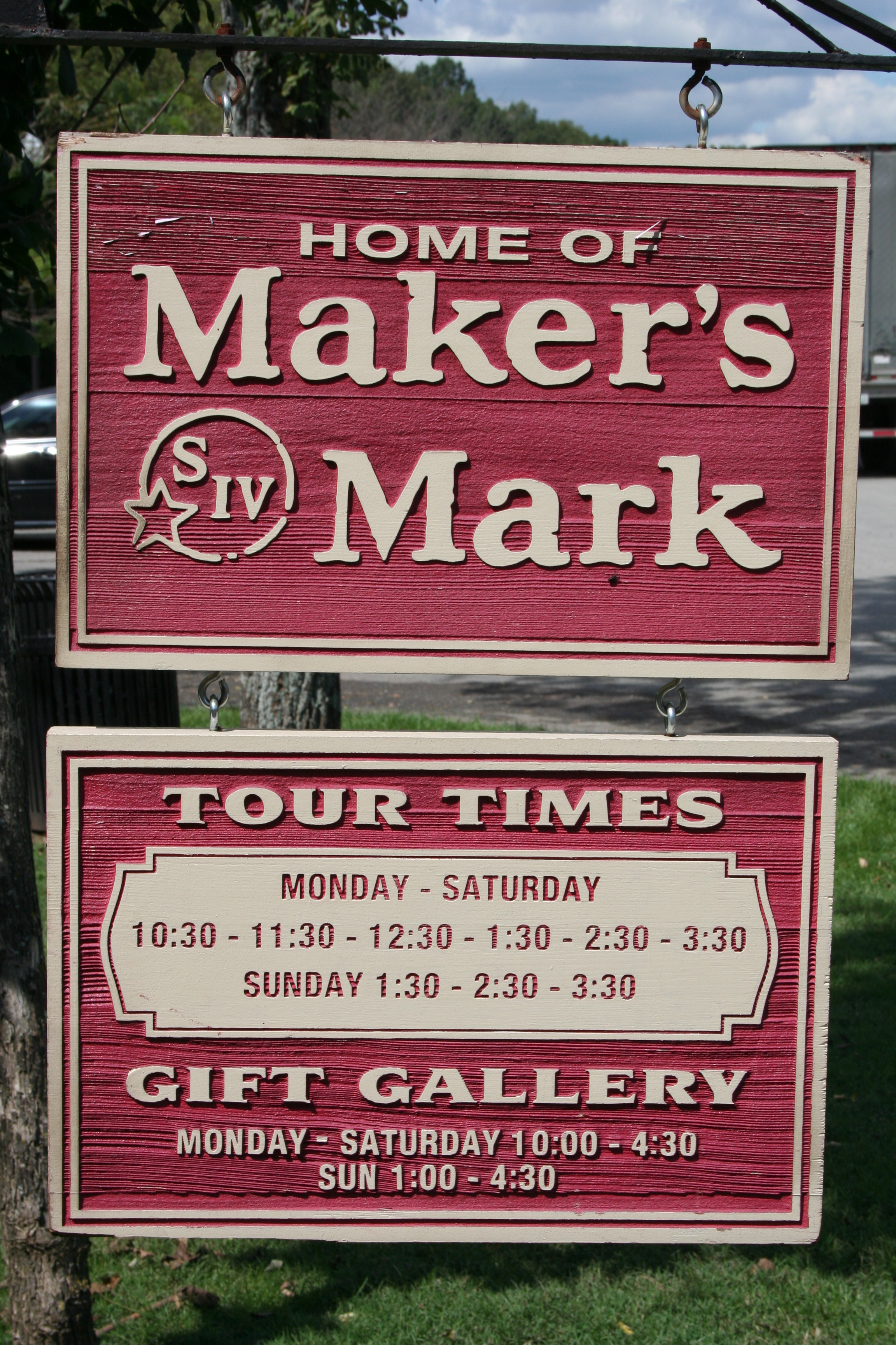 Maker's Mark, Willkommensschild mit Logo am Produktionsstandort Loretto